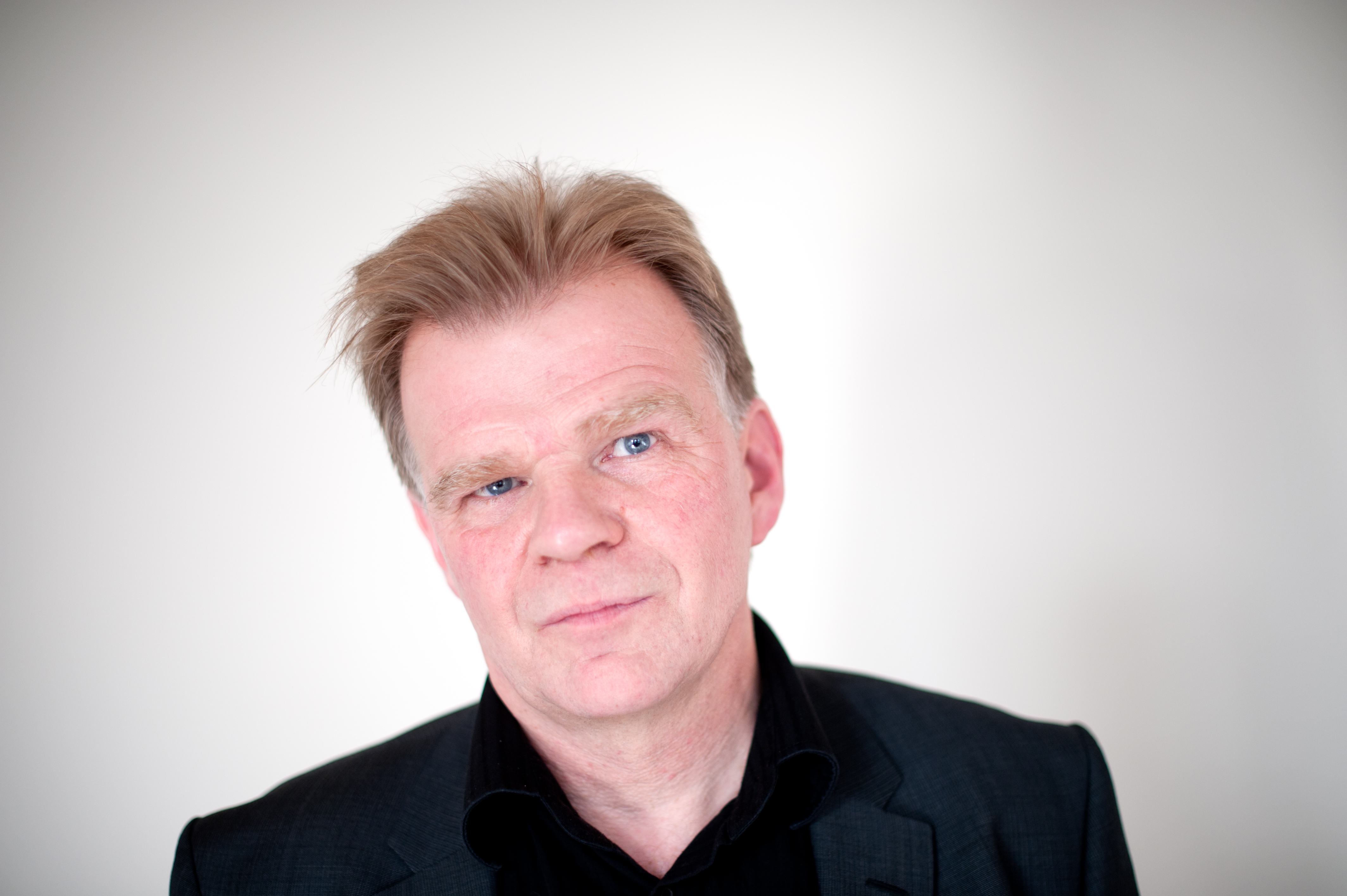 Den Isländska författaren Einar Már Guðmundsson vid ett litteraturseminarium i Oslo 2011-04-11.